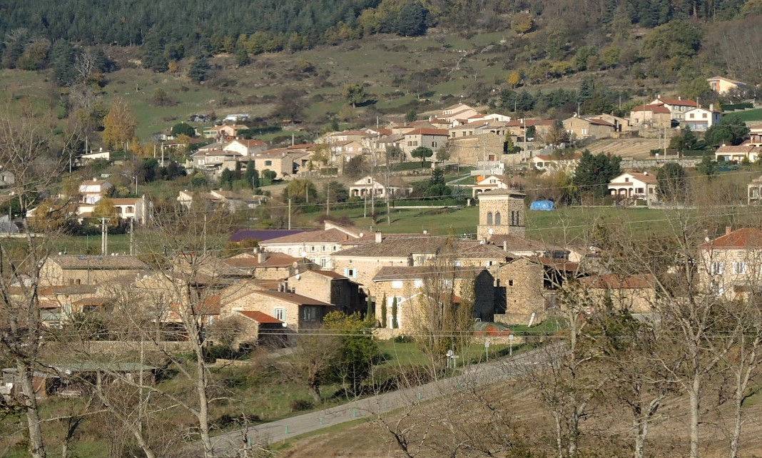 Saint-Clair (Ardèche) St-Clair et Combes